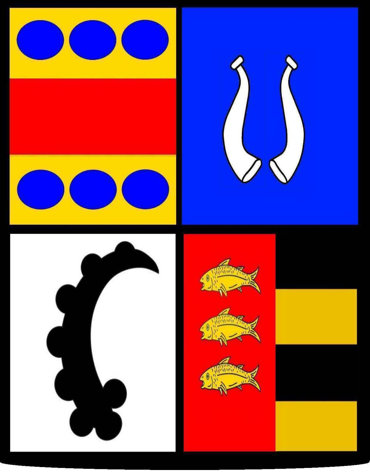 COA Rudolf Anton von Buol-Schauenstein, Blasonierung: Ein quadrierter Schild, Feld 1 in Gold ein roter Querbalken begleitet oben und unten von drei blauen Kugeln, Feld 2 in Blau die silbernen Büffelhörner und Feld 3 in Silber das schwarze Gemshorn von Haldenstein, Feld 4 in Rot die goldenen Fische für Schauenstein, und Feld 5 in Gold zwei schwarze Querbalken.